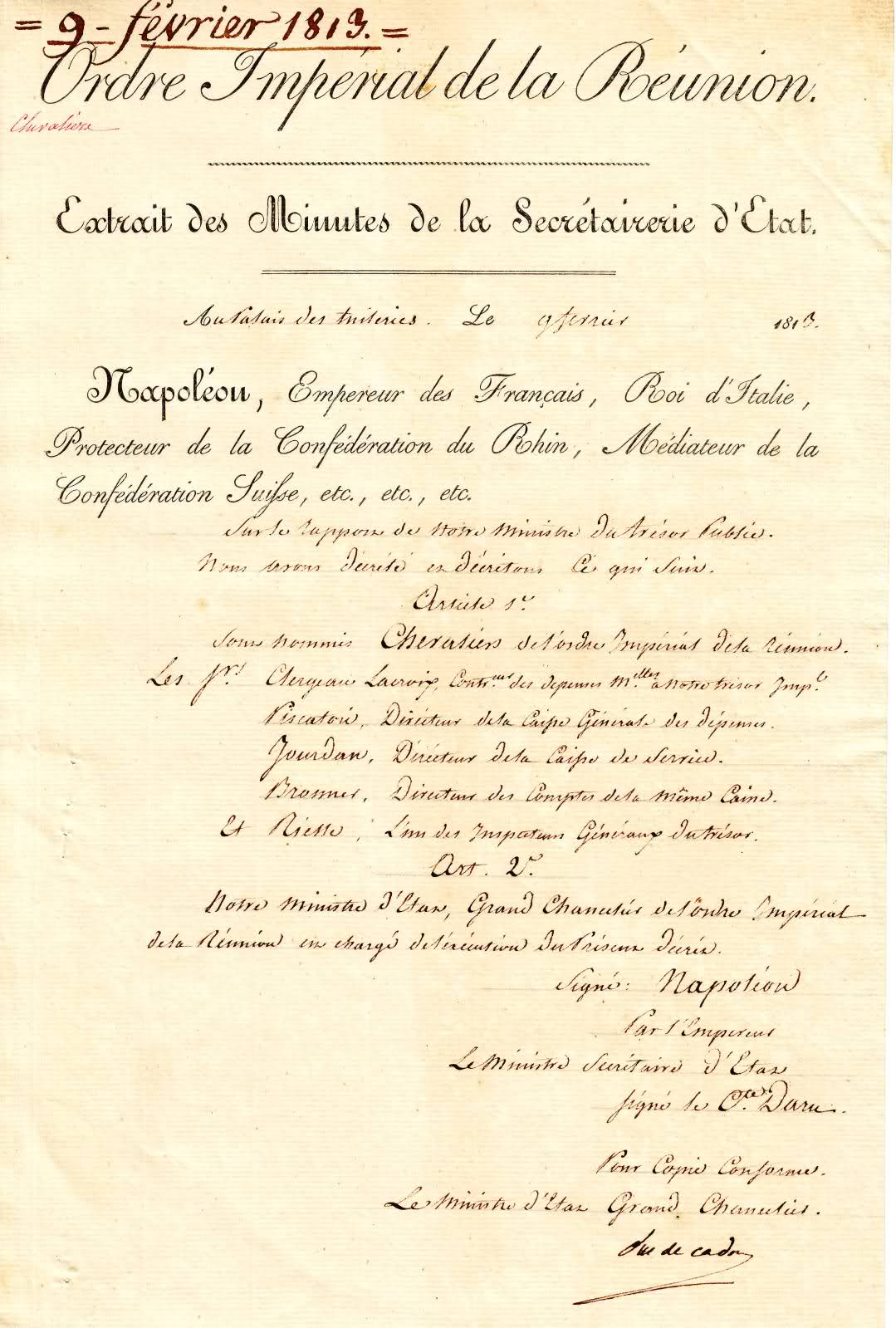 Décret de nomination de chevaliers de l'Ordre de la Réunion (1813).